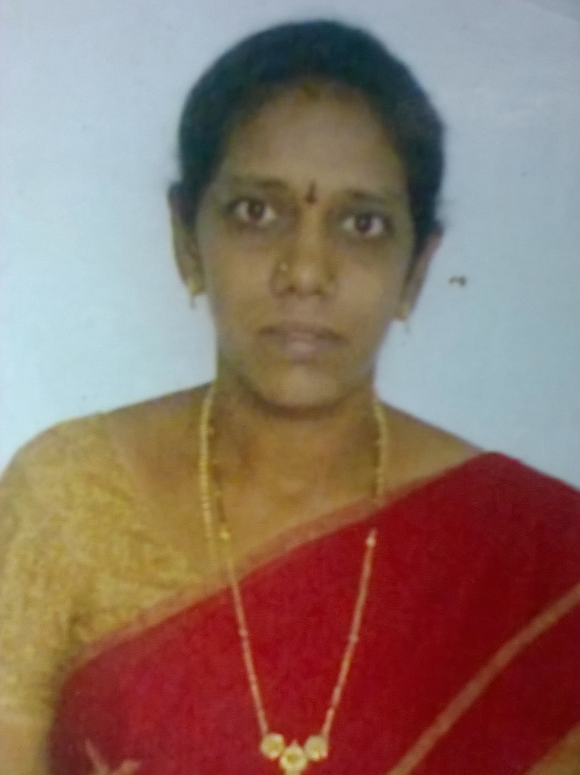 పమ్మిన రమాదేవి, జాతీయ ఉత్తమ ఉపాధ్యాయ గ్రహీత 2015